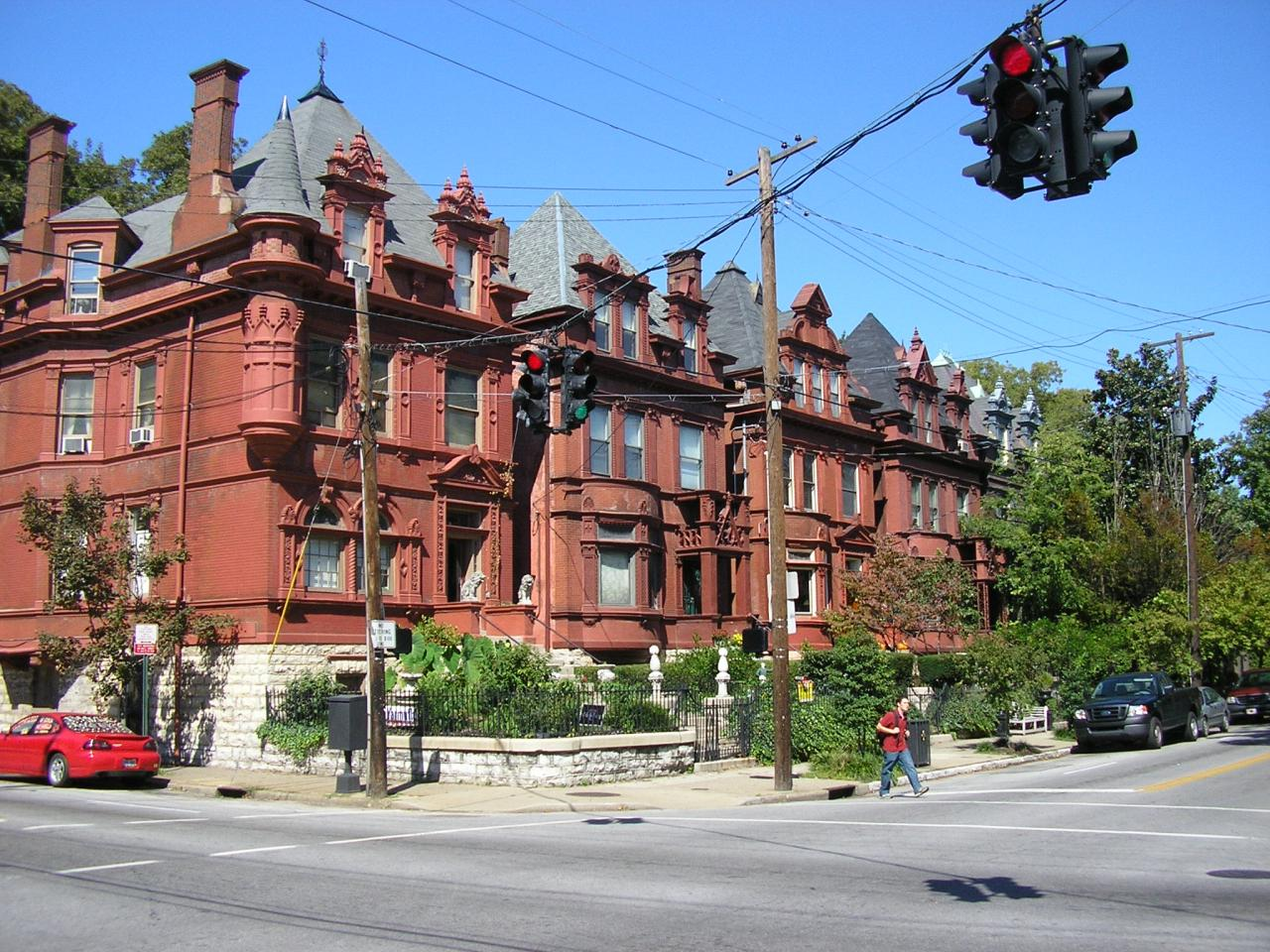 Louisville Chateauesque